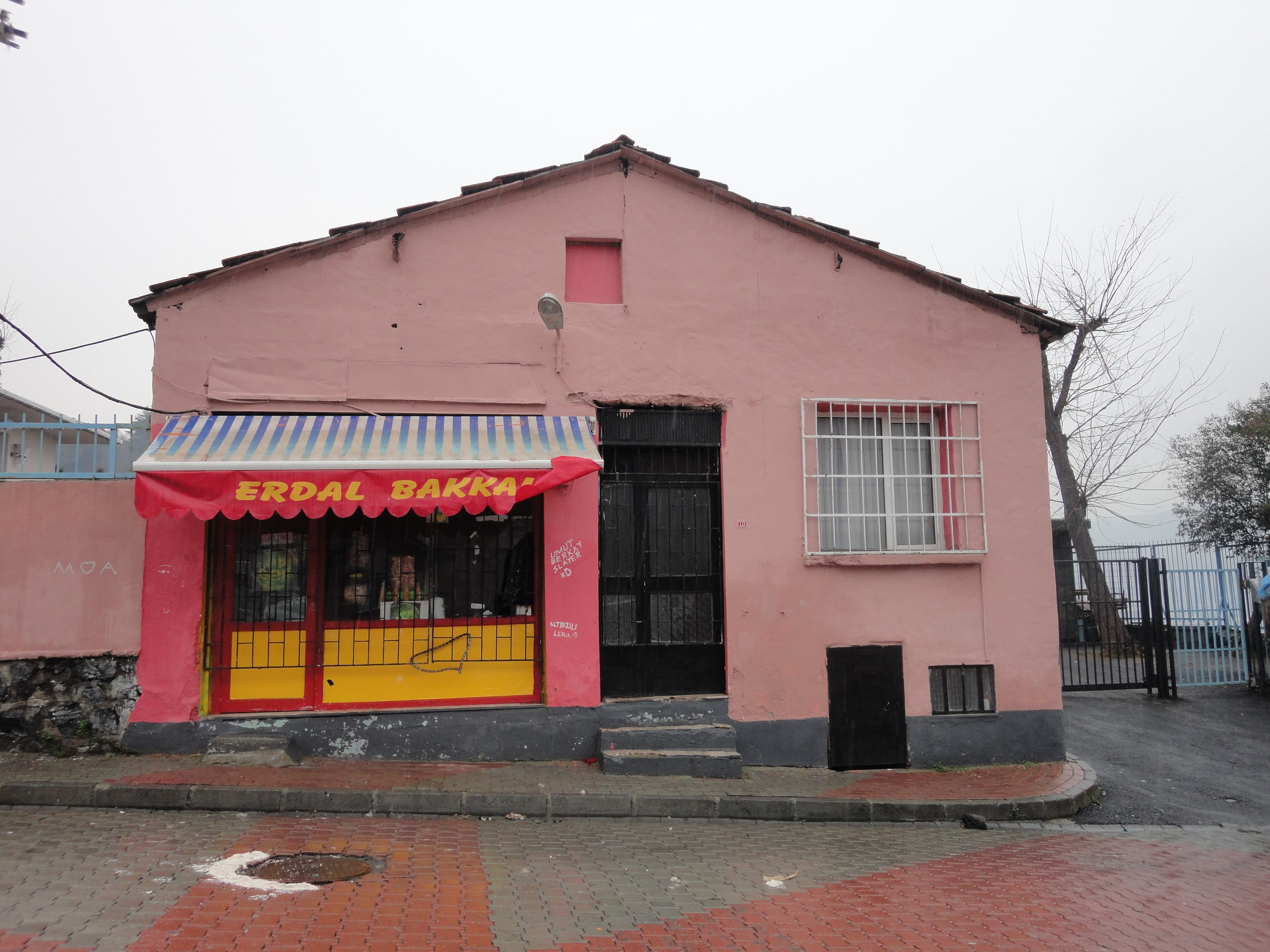 Leyla ile Mecnun'un çekim mekanlarından biri olan Erdal Bakkal ve evi.